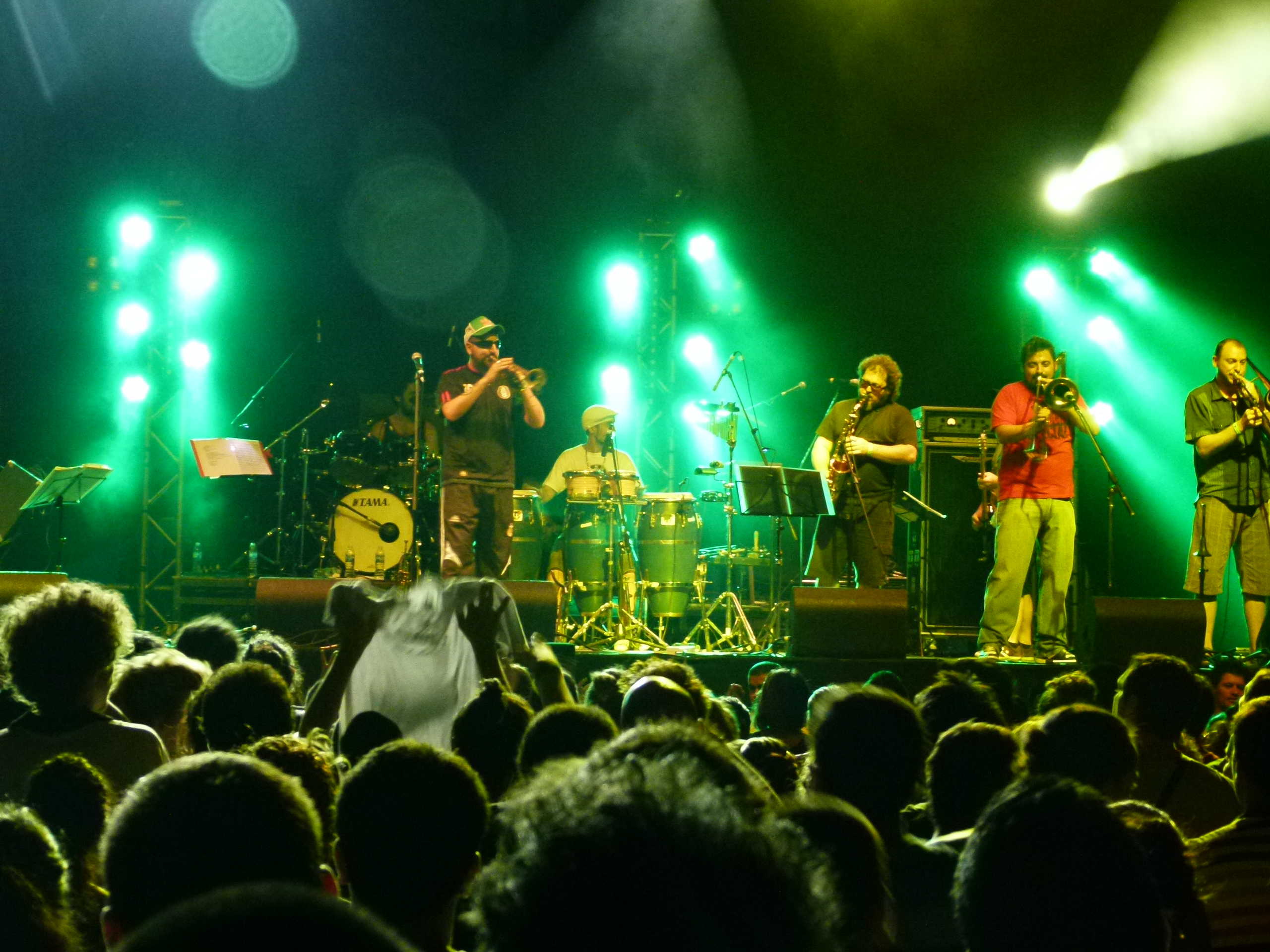 Dancing Mood durante un recital en el estadio Malvinas Argentinas en diciembre de 2012.